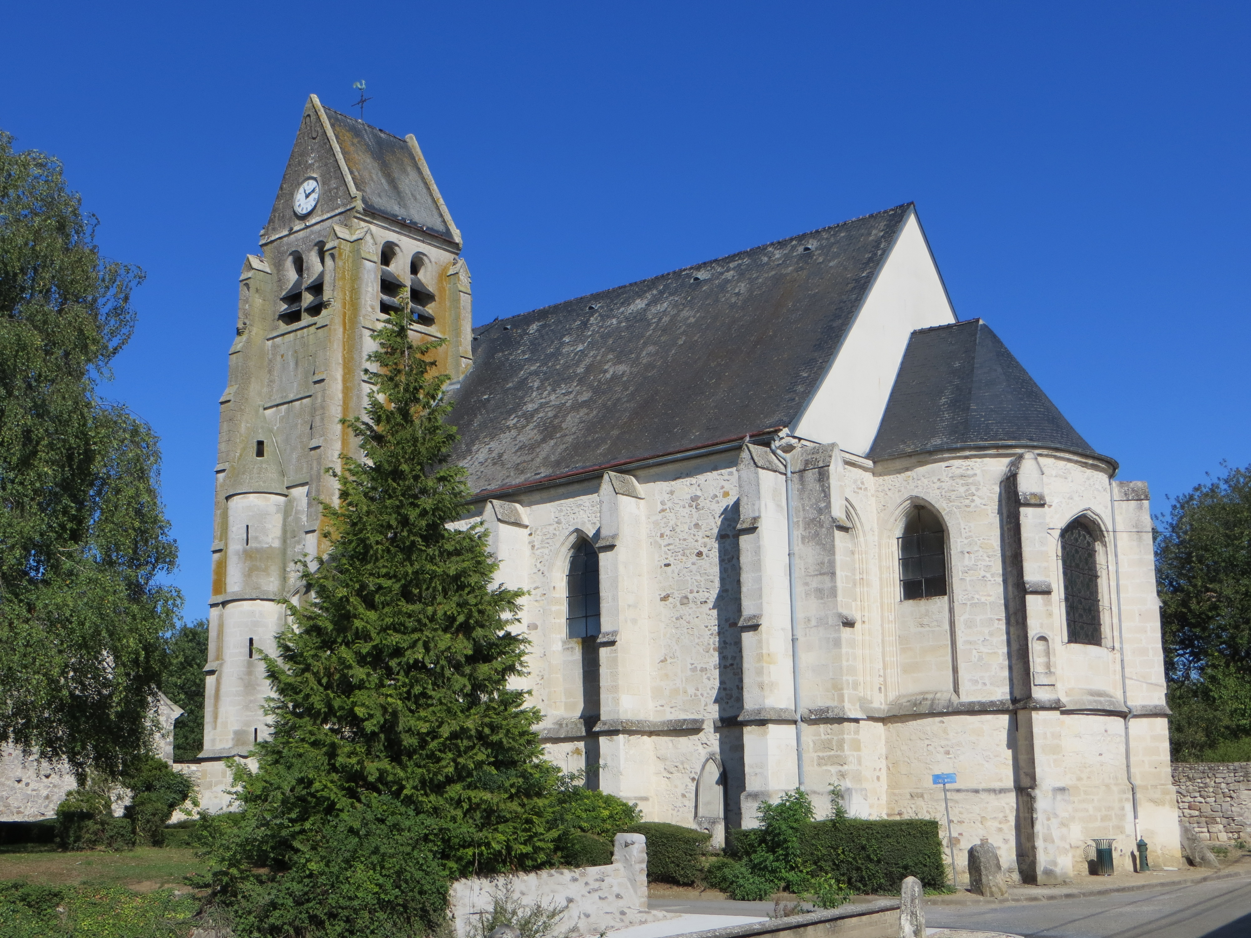 Vue générale de l'église